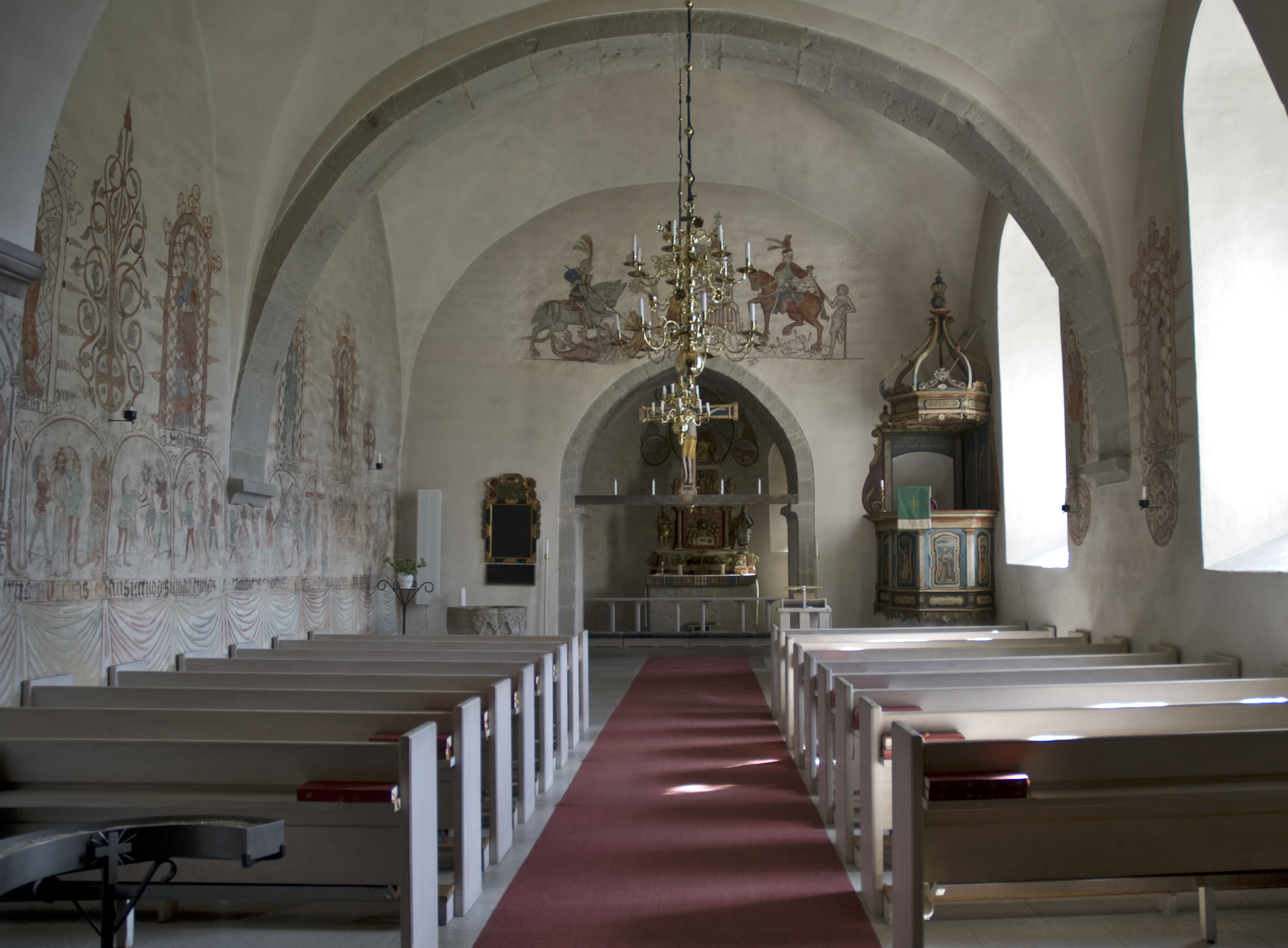 Hemse kyrka, Gotland